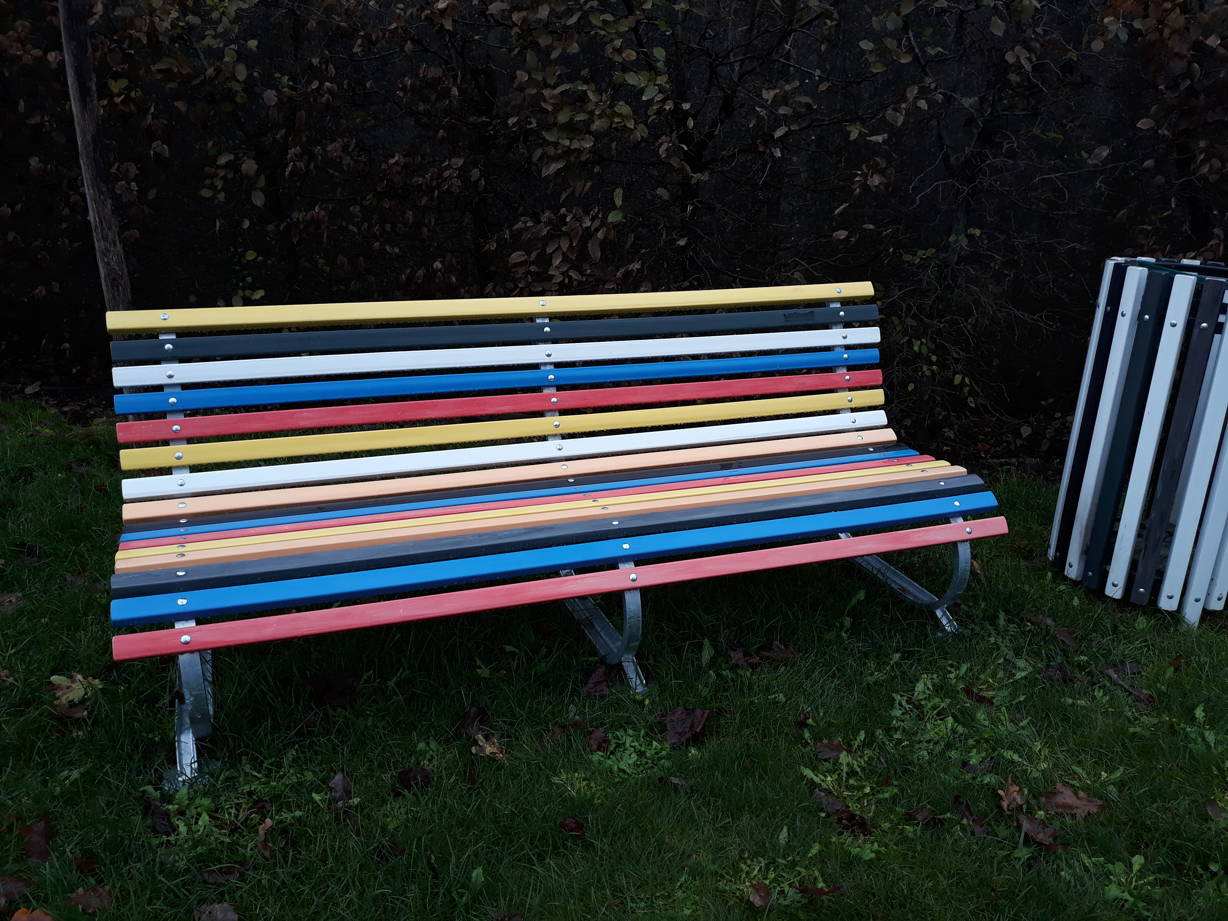 panchina realizzata con doghe in PVC riciclato